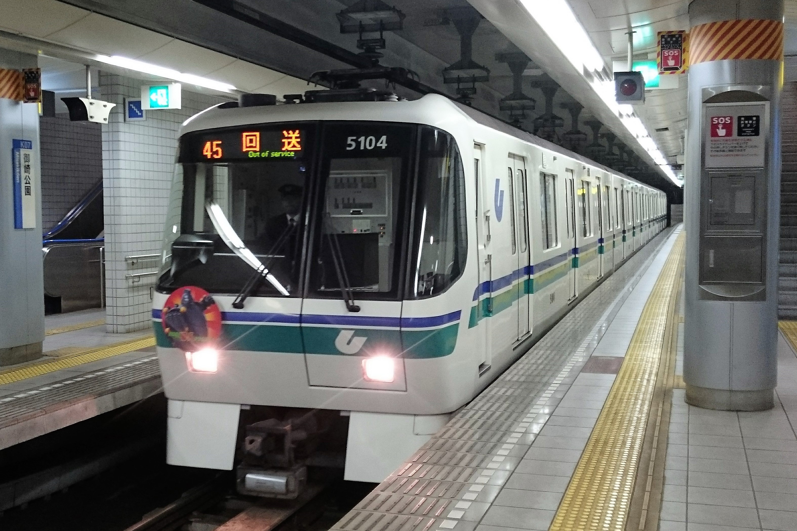 神戸市交通局 神戸市営地下鉄海岸線用車両 5000形車両の全体写真。御崎公園駅3・4番線より撮影。車両は御崎公園どまりの回送電車。御崎公園19時59分発車。